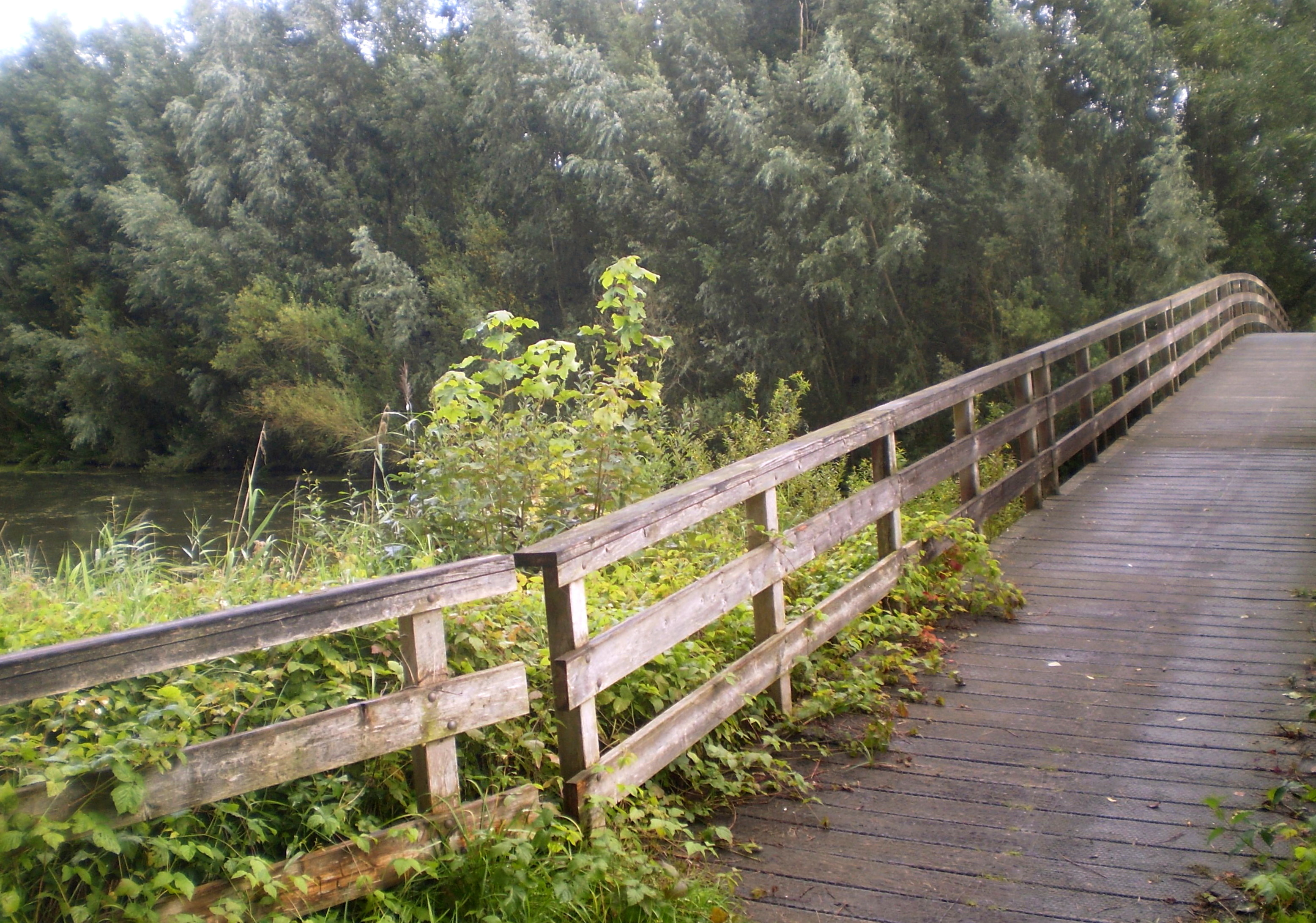 Voetbrug over de Hoge Dwarsvaart, die midden door het Harderbos in Flevoland loopt